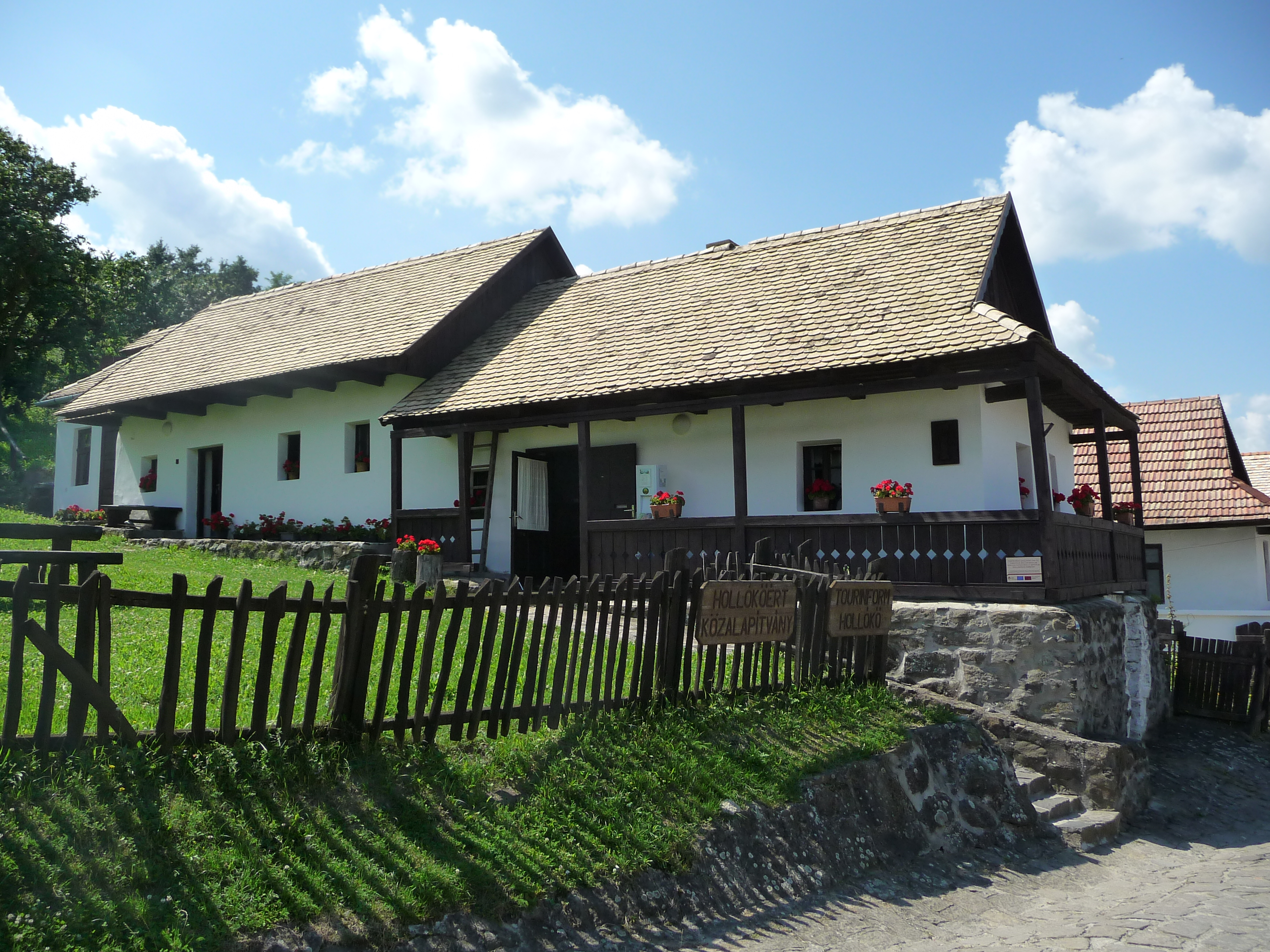 Hollókő, Kossuth L. út 68.